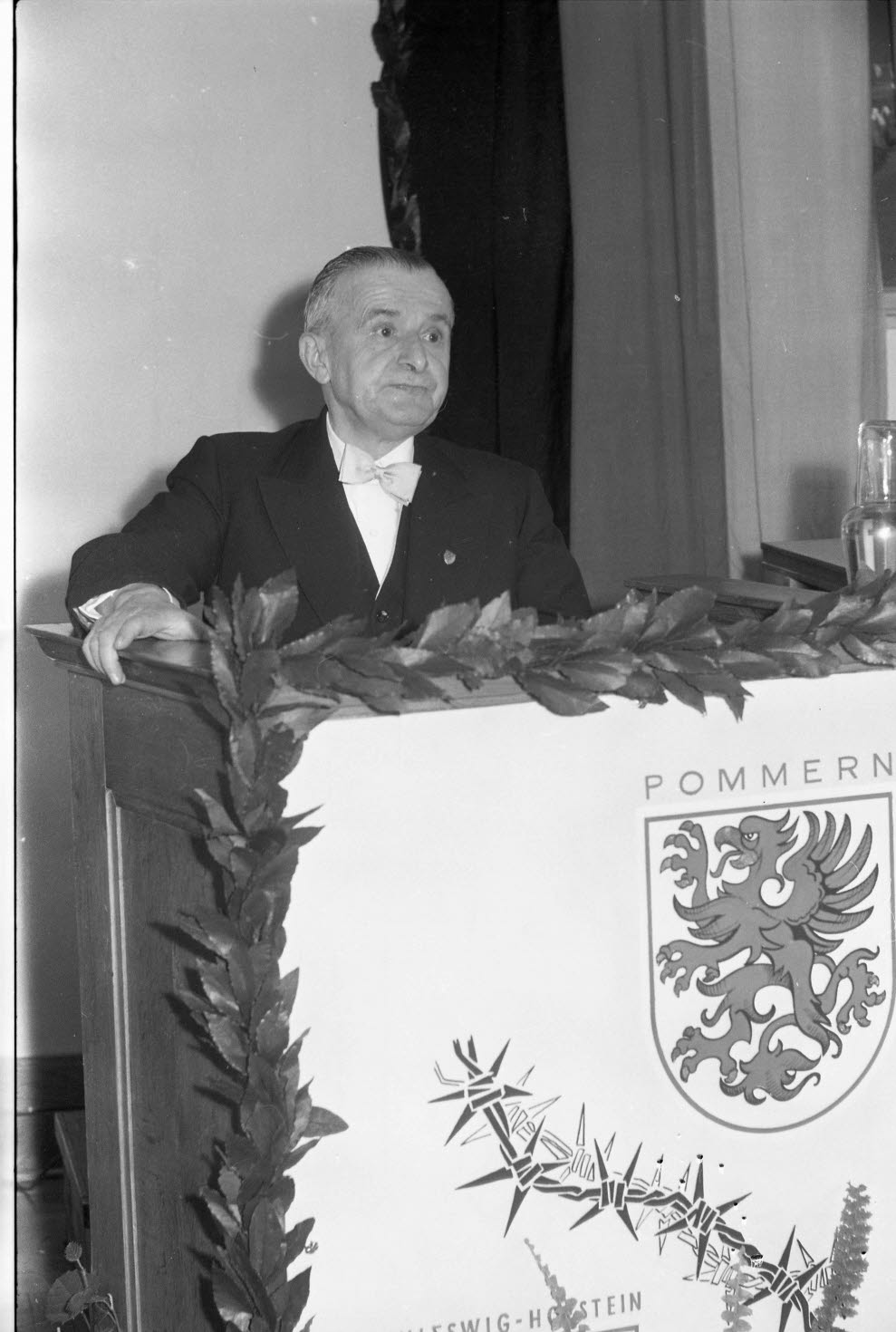 im Landeshaus. Im Bild der Kulturpreisträger und Komponist Wilhelm Wapenhensch am Rednerpult.